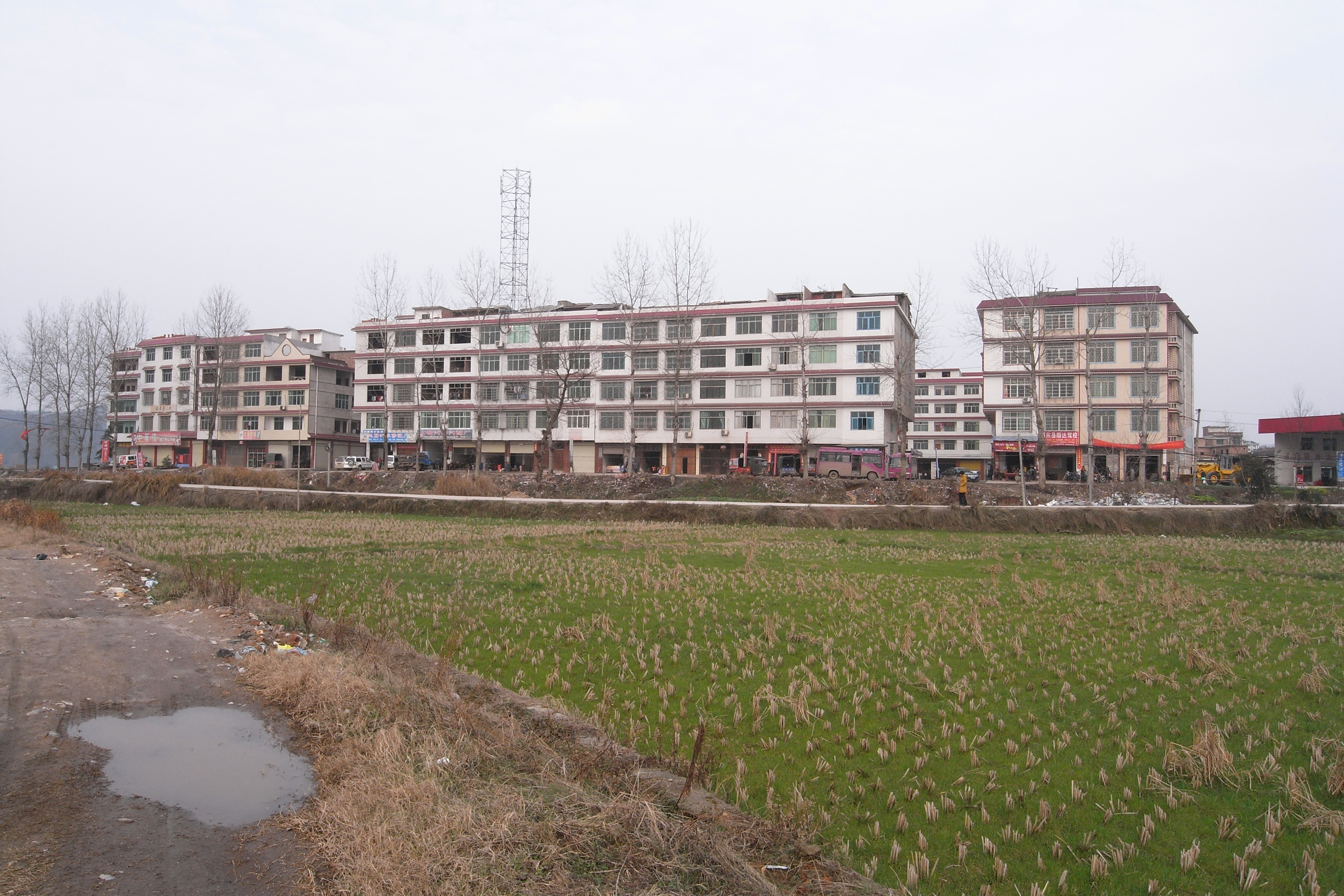 Shaodong, Shaoyang, Hunan, China